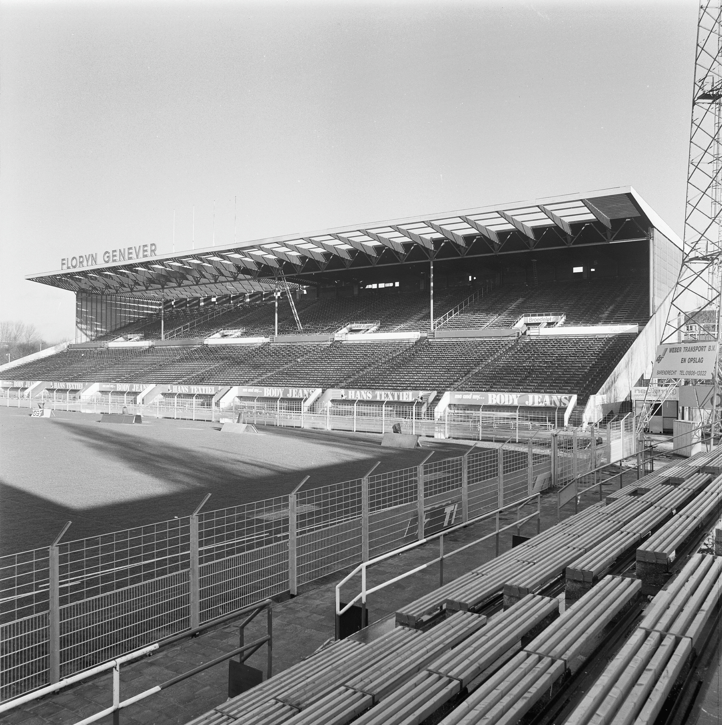 STADION (SPARTA) / CLUBGEBOUW SPANGEN: Exterieur OVERZICHT SCHIETRIBUNE